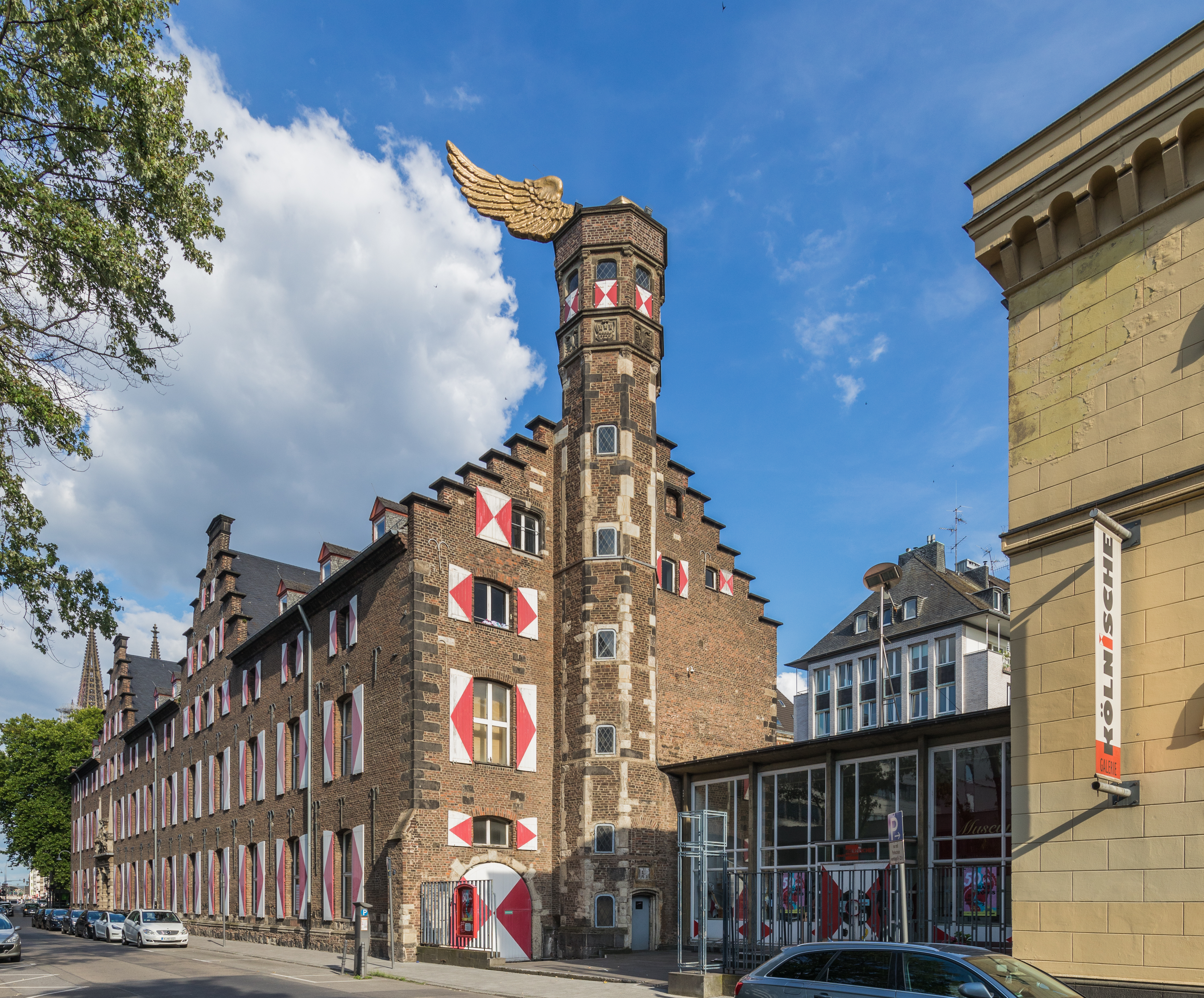 Zeughaus, Zeughausstraße Köln. Hier zeigte das Kölnisches Stadtmuseum seine Dauerausstellung. Auf dem Turm ist das Flügelauto von HA Schult montiert